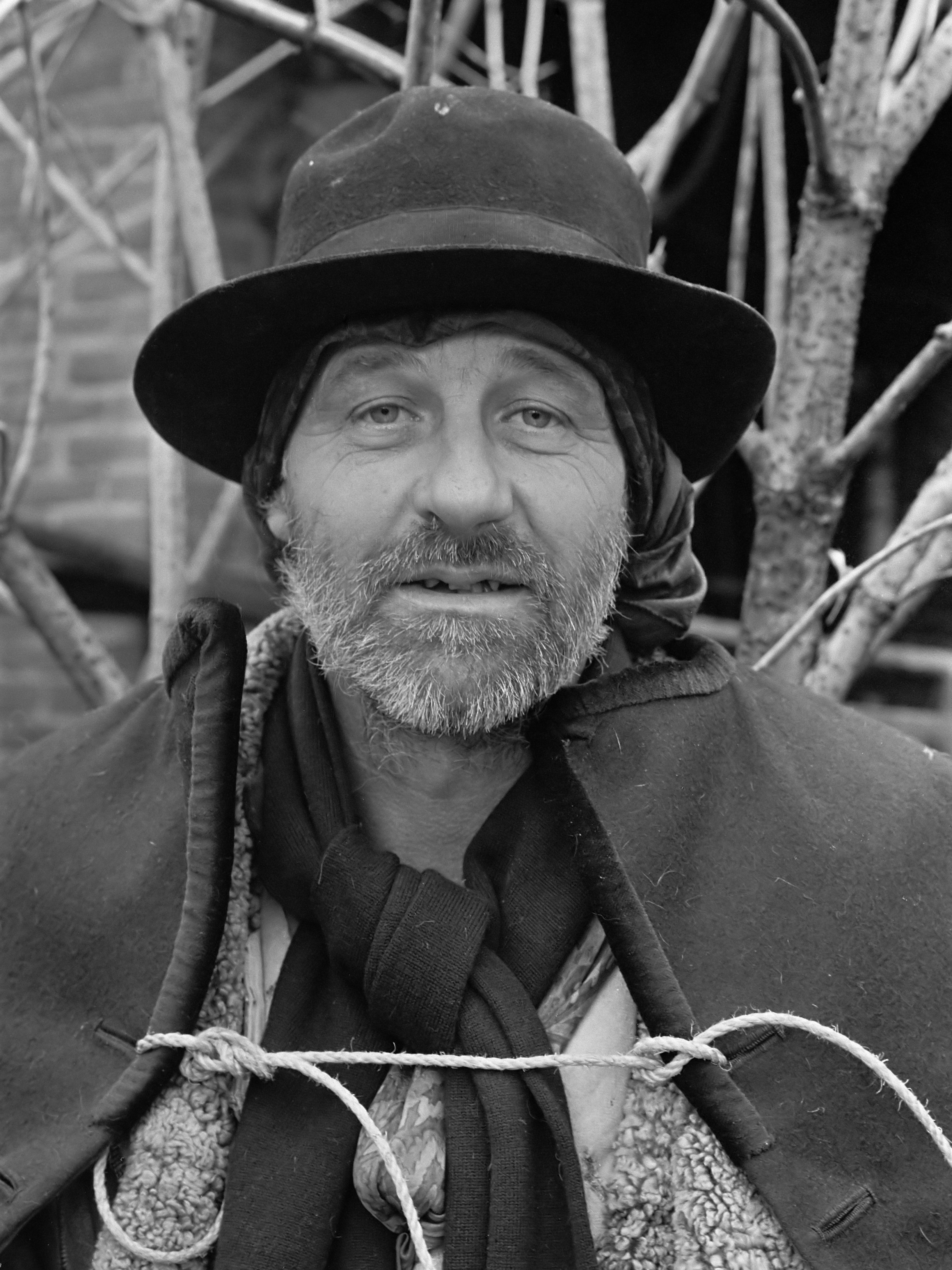 Kunstenaar Anton Heyboer krijgt in Den Ilp 1e exempla "De drie bruiden van Anton Heyboer" geschreven door Henk van der Meyden ; Anton Heyboer (kop) / 28 november 1974